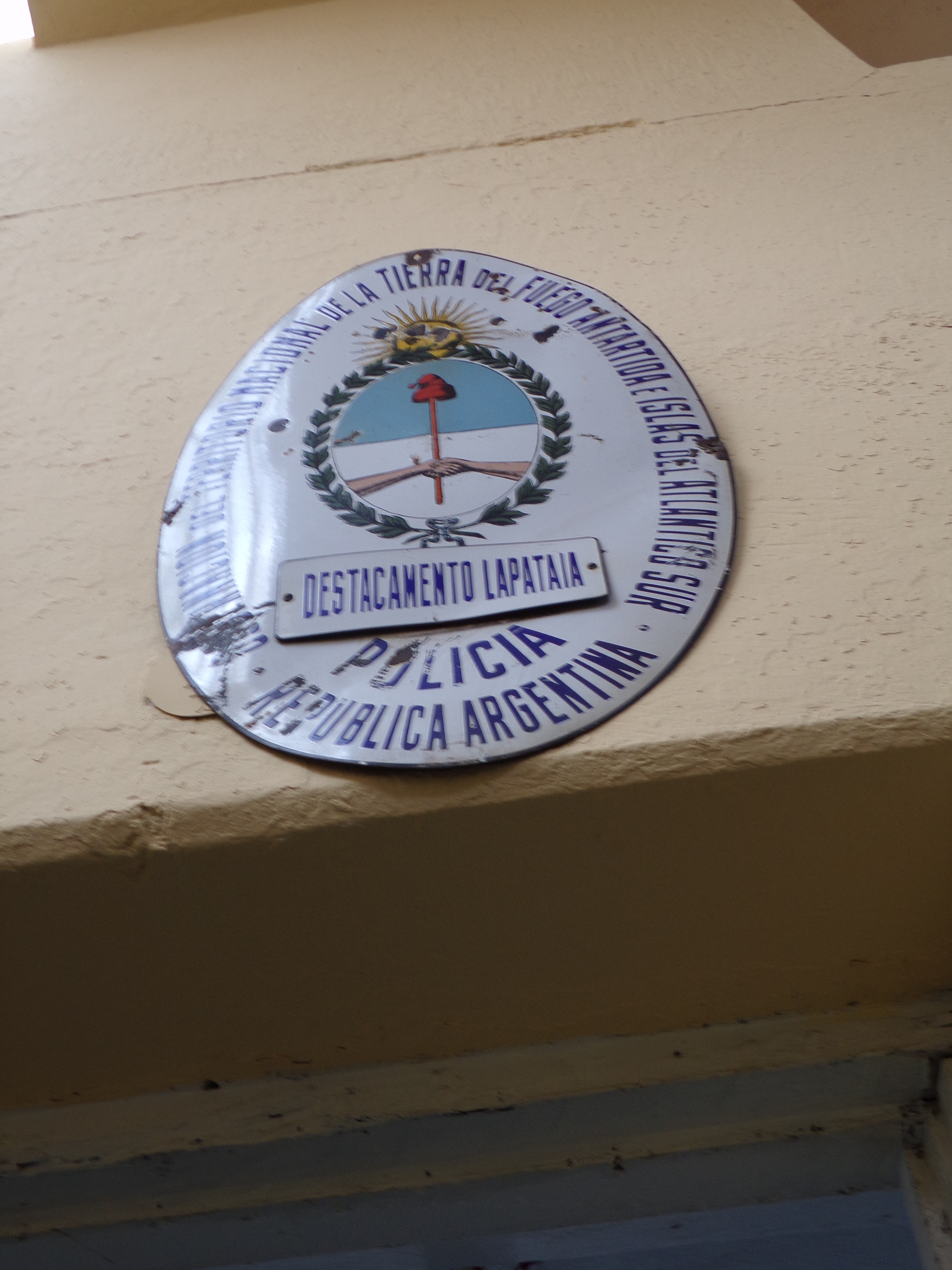 Museo Maritimo y Ex Presidio de Ushuaia, TDF, Arg